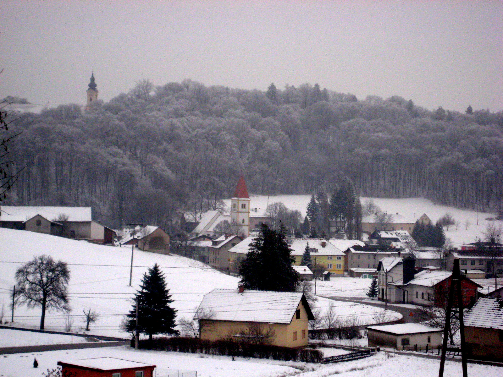 Grad, village in Goričko, Slovenia